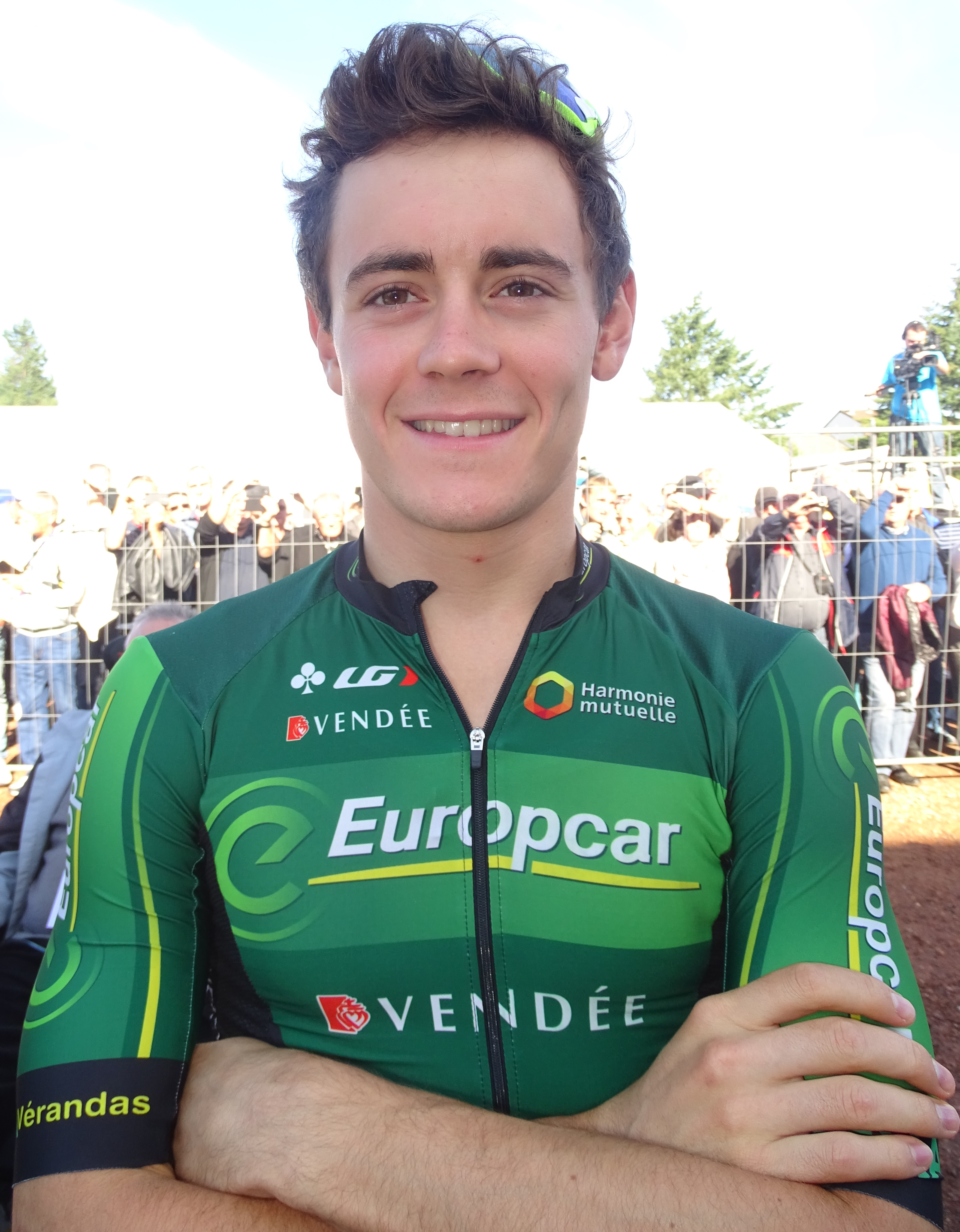 Reportage réalisé le dimanche 20 septembre à l'occasion du départ et de l'arrivée du Grand Prix d'Isbergues 2015 à Isbergues, Nord-Pas-de-Calais, France.